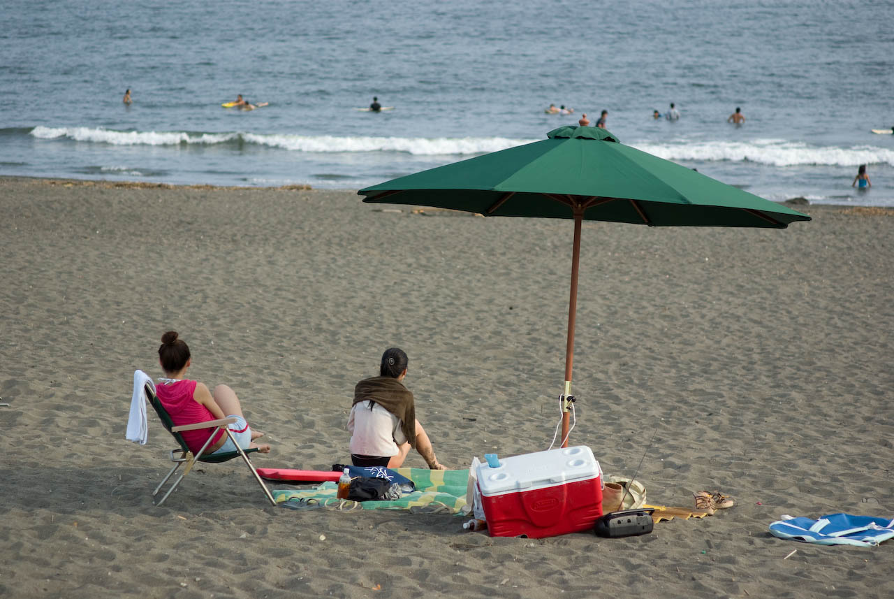 8月の辻堂海岸。